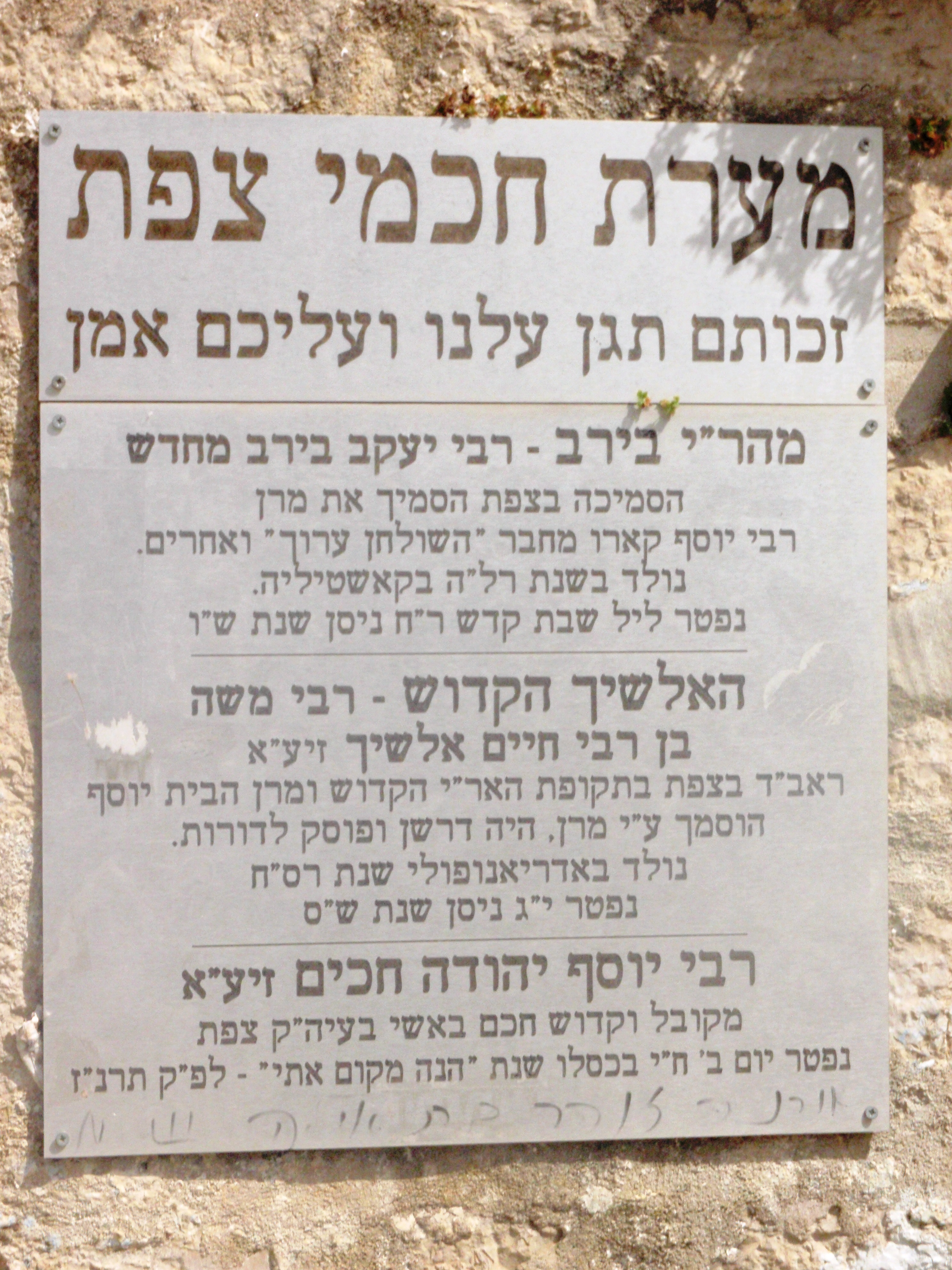 מערת חכמי צפת2